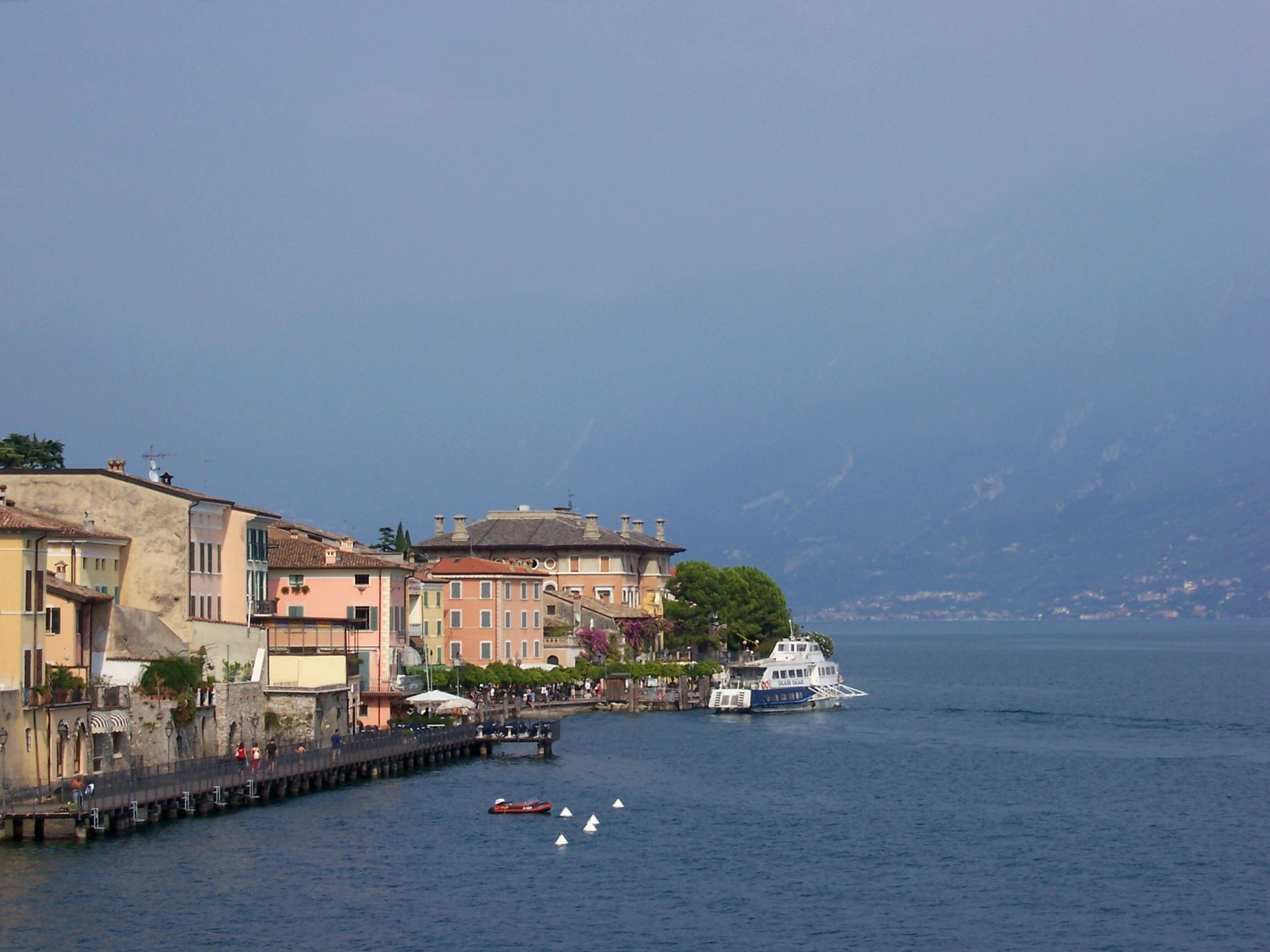 Gargnano